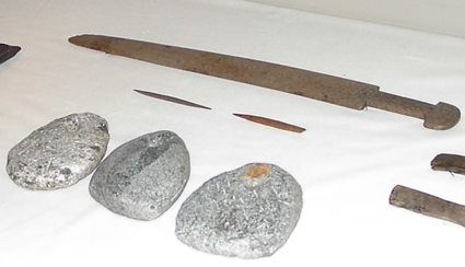 Medeltida Varptyngder från Lödöse